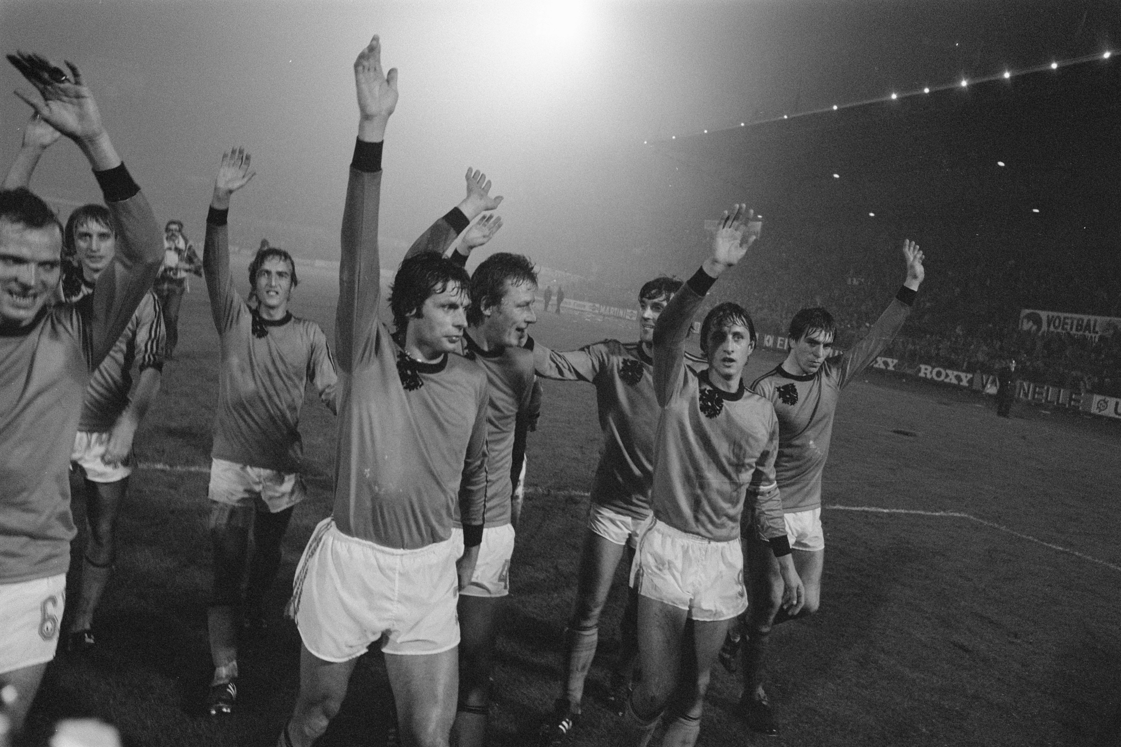 Collectie / Archief : Fotocollectie Anefo Reportage / Serie : [ onbekend ] Beschrijving : Nederland tegen Belgie 1-0, na afloop v.l.n.r. Neeskens, Suurbier, Hovenkamp, Krol, Cruijff en Dusbaba Datum : 26 oktober 1977 Locatie : België, Nederland Trefwoorden : sport, voetbal Persoonsnaam : Cruijff, Johan, Dusbaba, Hovenkamp Fotograaf : Verhoeff, Bert / Anefo Auteursrechthebbende : Nationaal Archief Materiaalsoort : Negatief (zwart/wit) Nummer archiefinventaris : bekijk toegang 2.24.01.05 Bestanddeelnummer : 929-4096